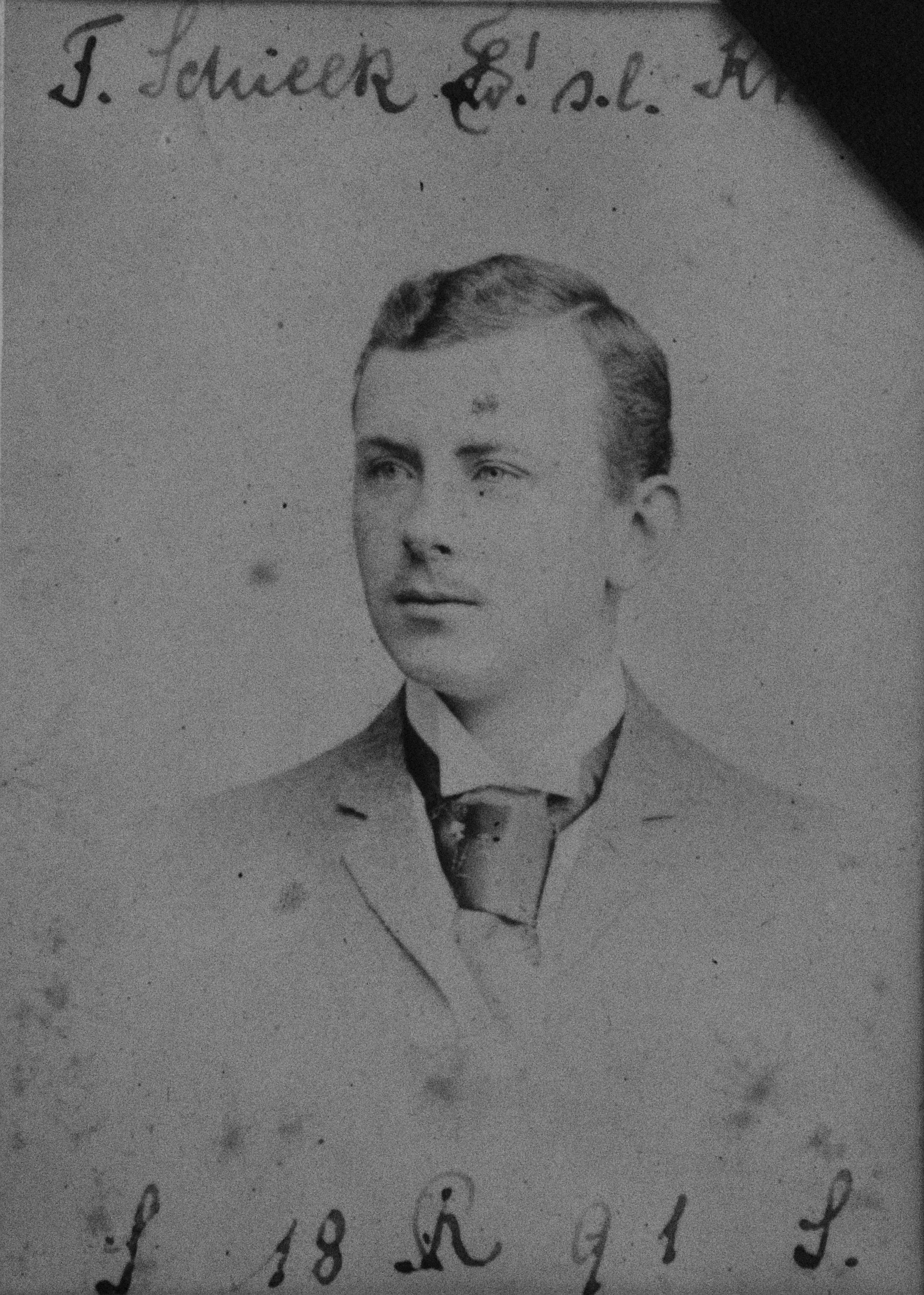 Fotografie von Franz Schieck als Mitglied der Studentenverbindung Leonensia. Über Schiecks Kopf befindet sich der Zirkel der Verbindung Leonensia. Standort der Fotografie: Ahnengalerie im Conventssaal der Verbindung Leonensia